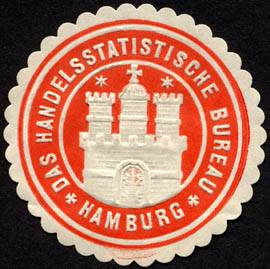 Sealing stamp Title: Das Handelsstatistische Bureau - Hamburg Description: rot, weiß, geprägt Place: Hamburg size: 4 cm